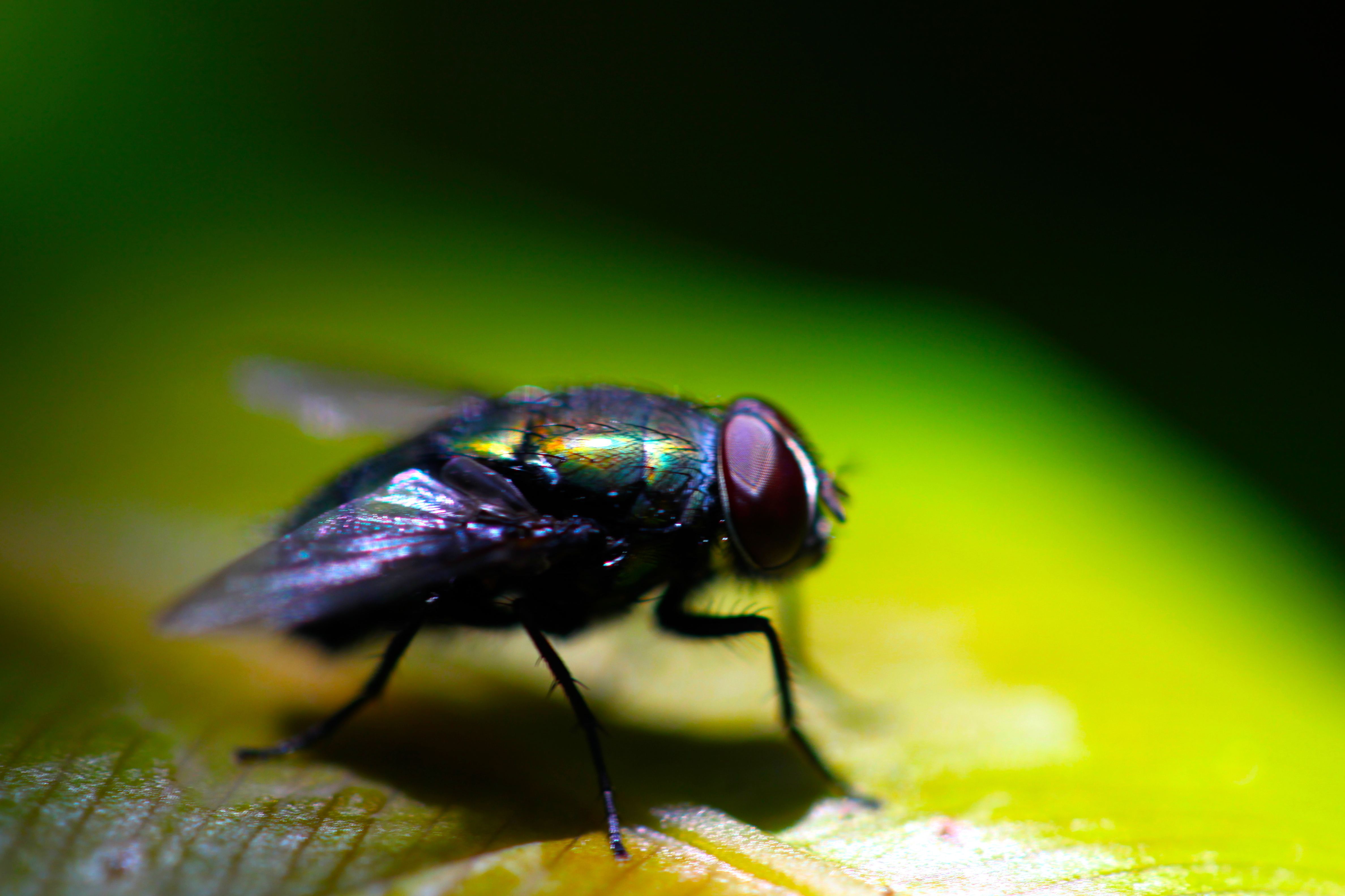 แมลงวัน